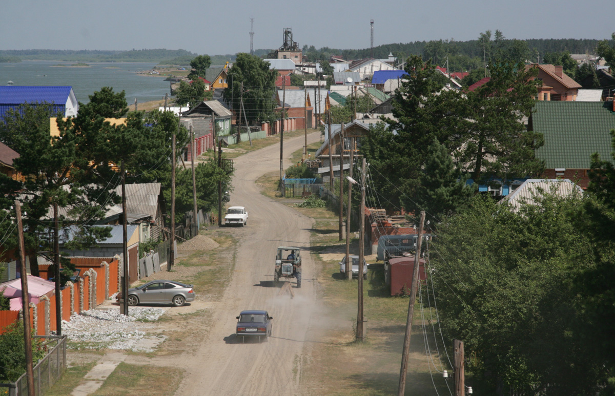 Улица в селе Победа